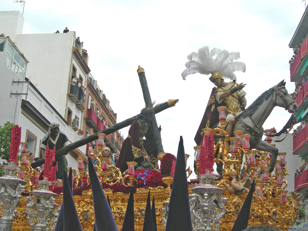 Semana Santa de Sevilla, mañana de Viernes Santo en Triana.